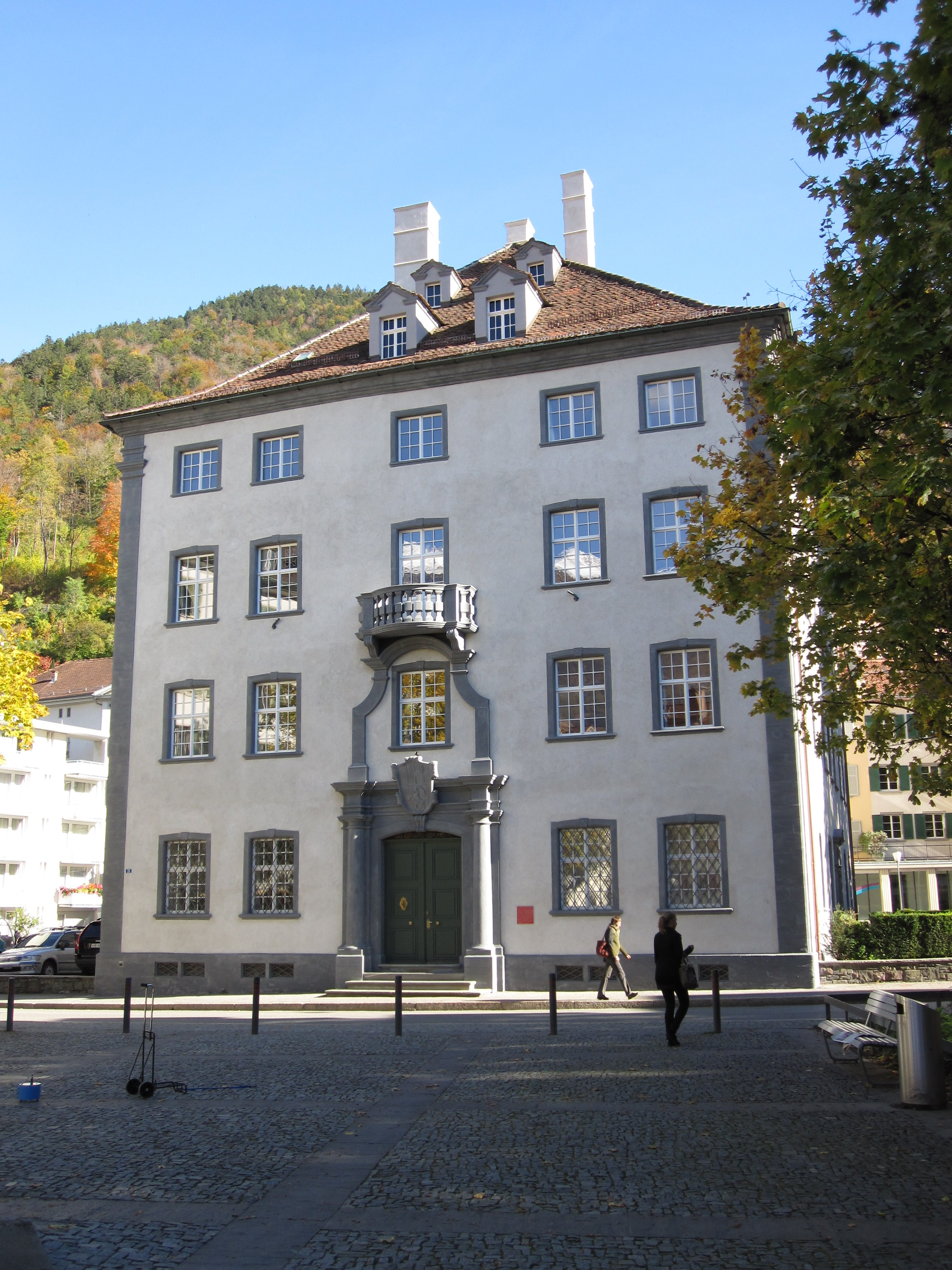 Graues Haus (Regierungssitz) in Chur